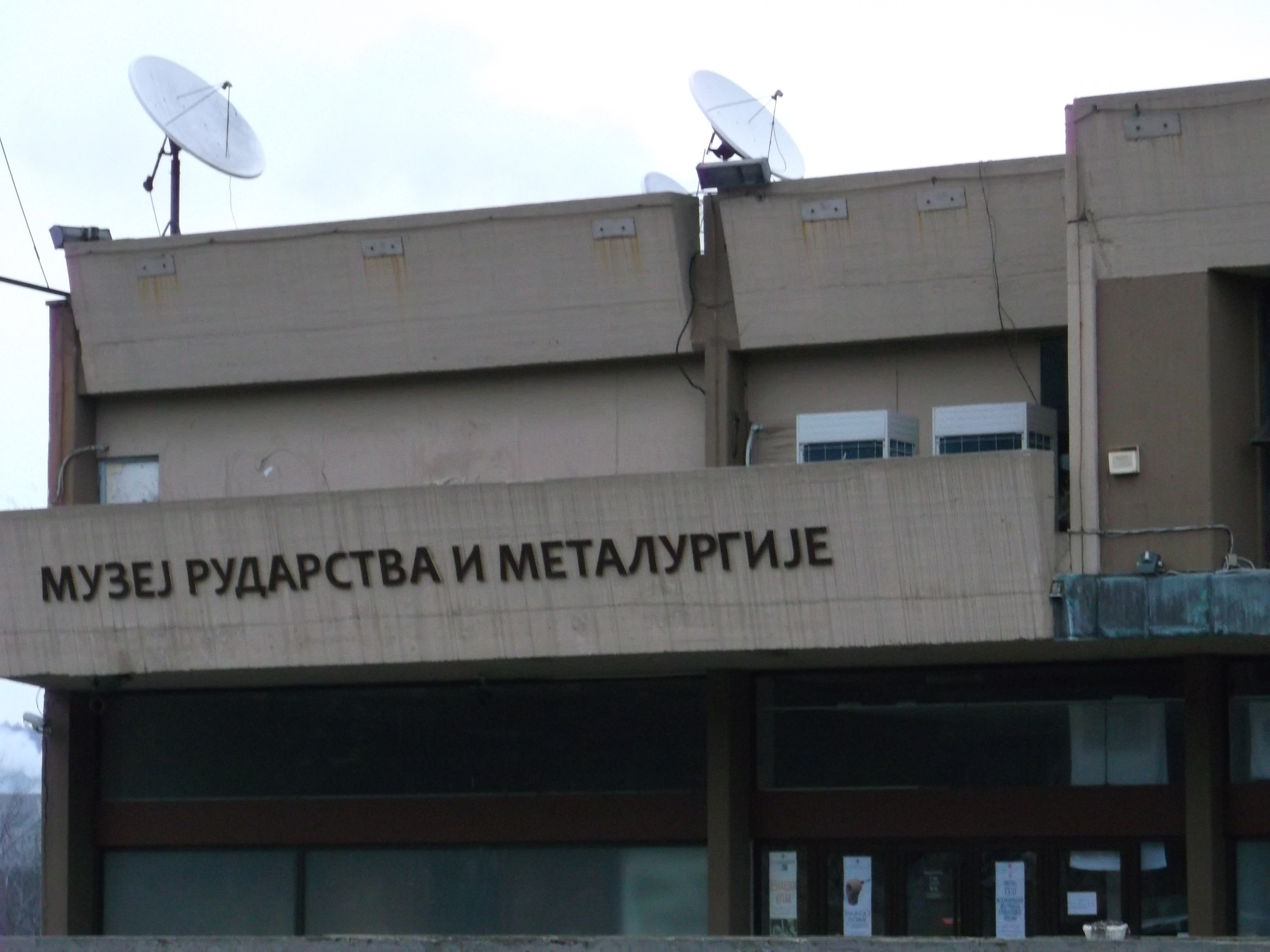 Музеј рударства и металургије Бор